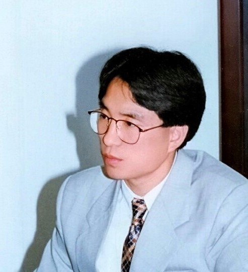 이 파일은 하승무 시인이 예브게니 주한러시아 수석영사와의 대담시 본인의 자동카메라로 촬영된 사진입니다.